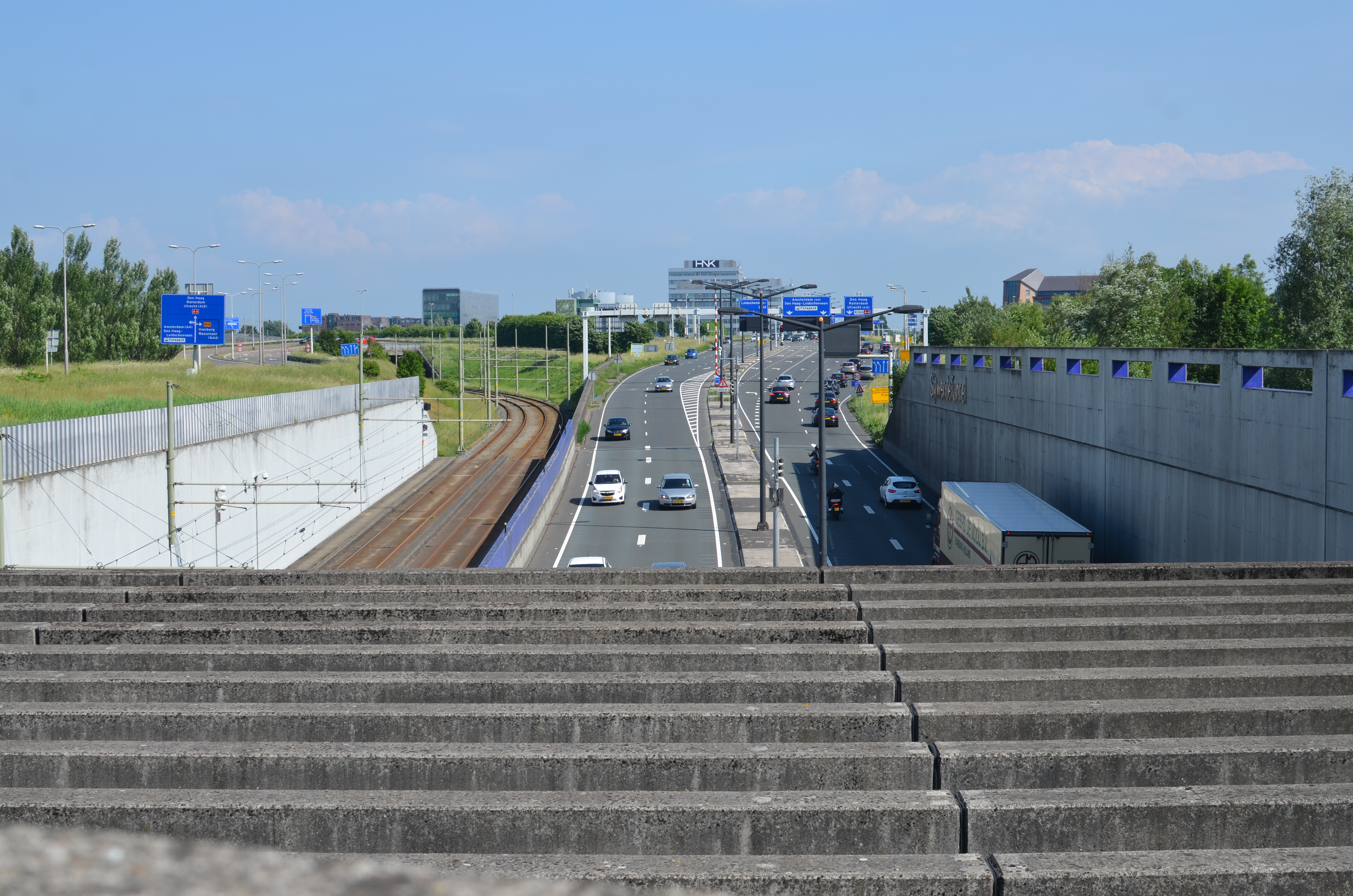 De zuidelijke toerit van de Sijtwendetunnel in Leidschendam-Voorburg.